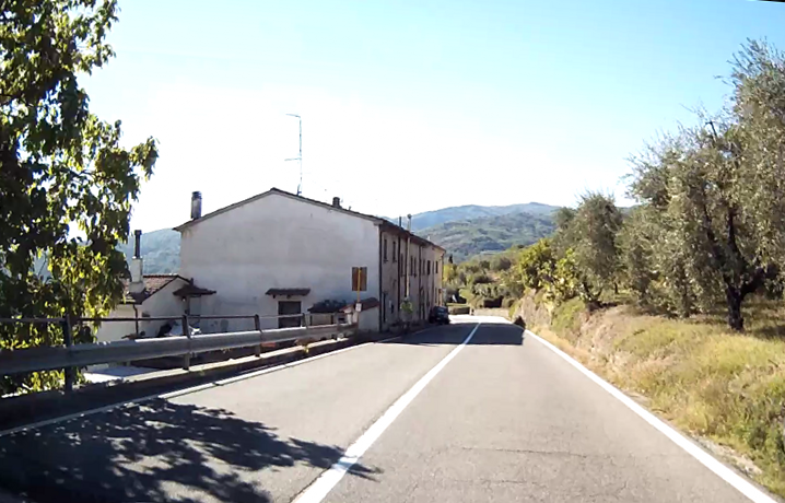 Pistoia, frazione Casa Lotti